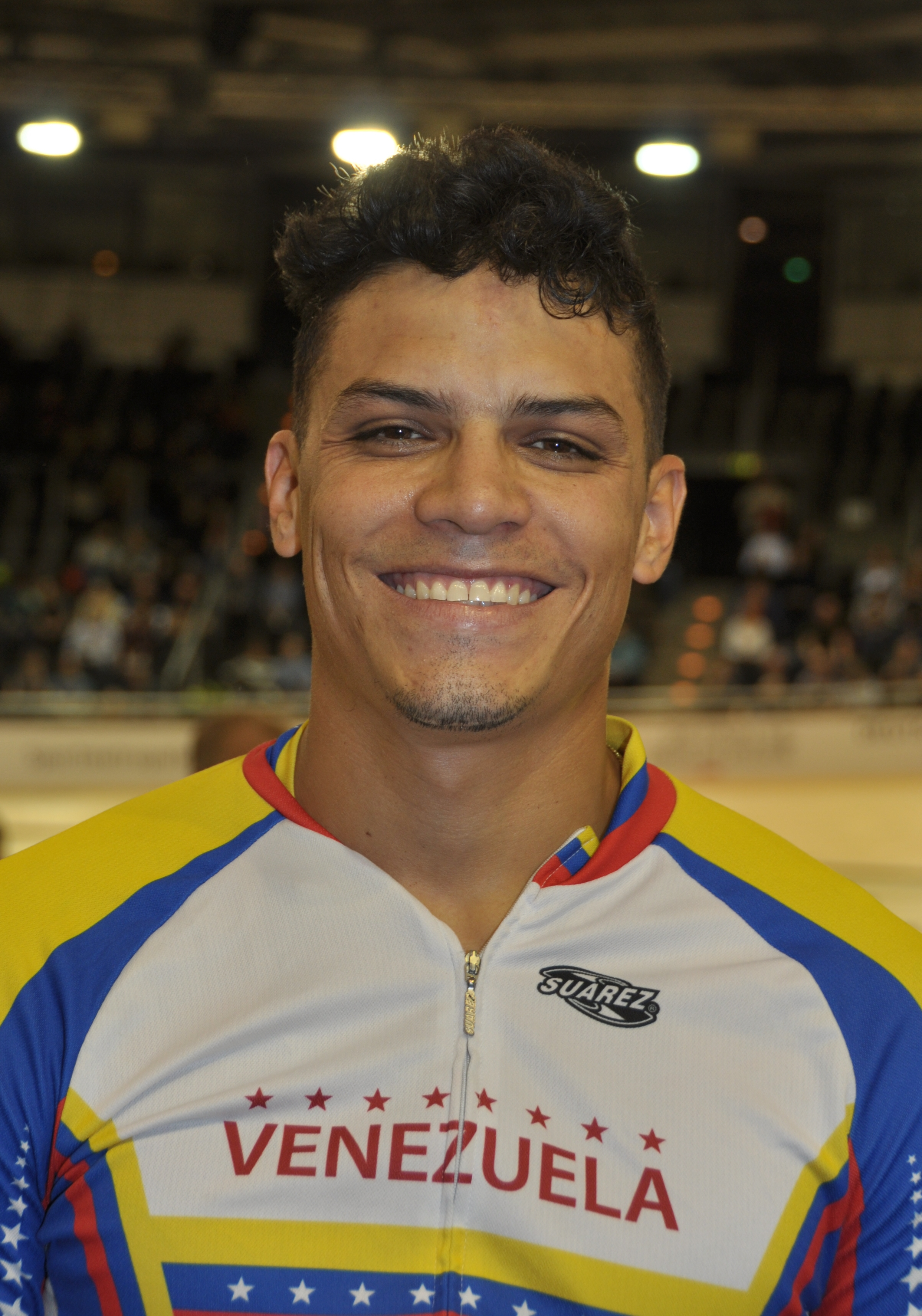 Hersony Canelon, venezolanischer Radsportler